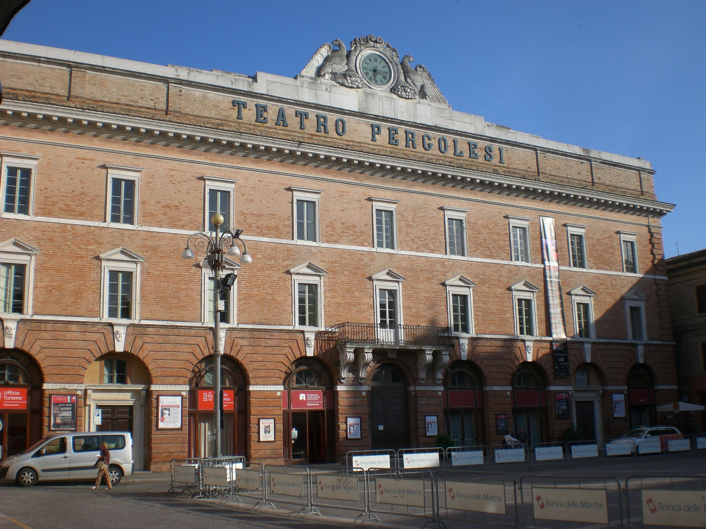 Jesi, Teatro Pergolesi, 1798